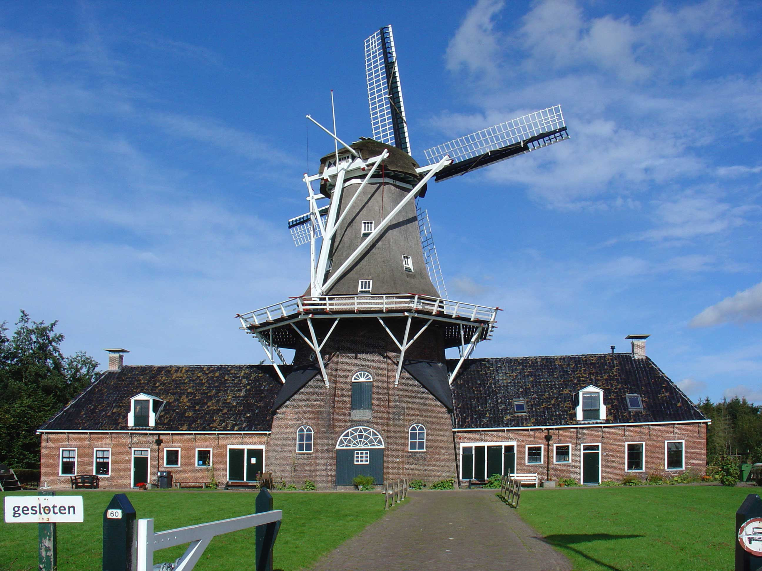 De graan- en oliemolen Woldzigt in Roderwolde